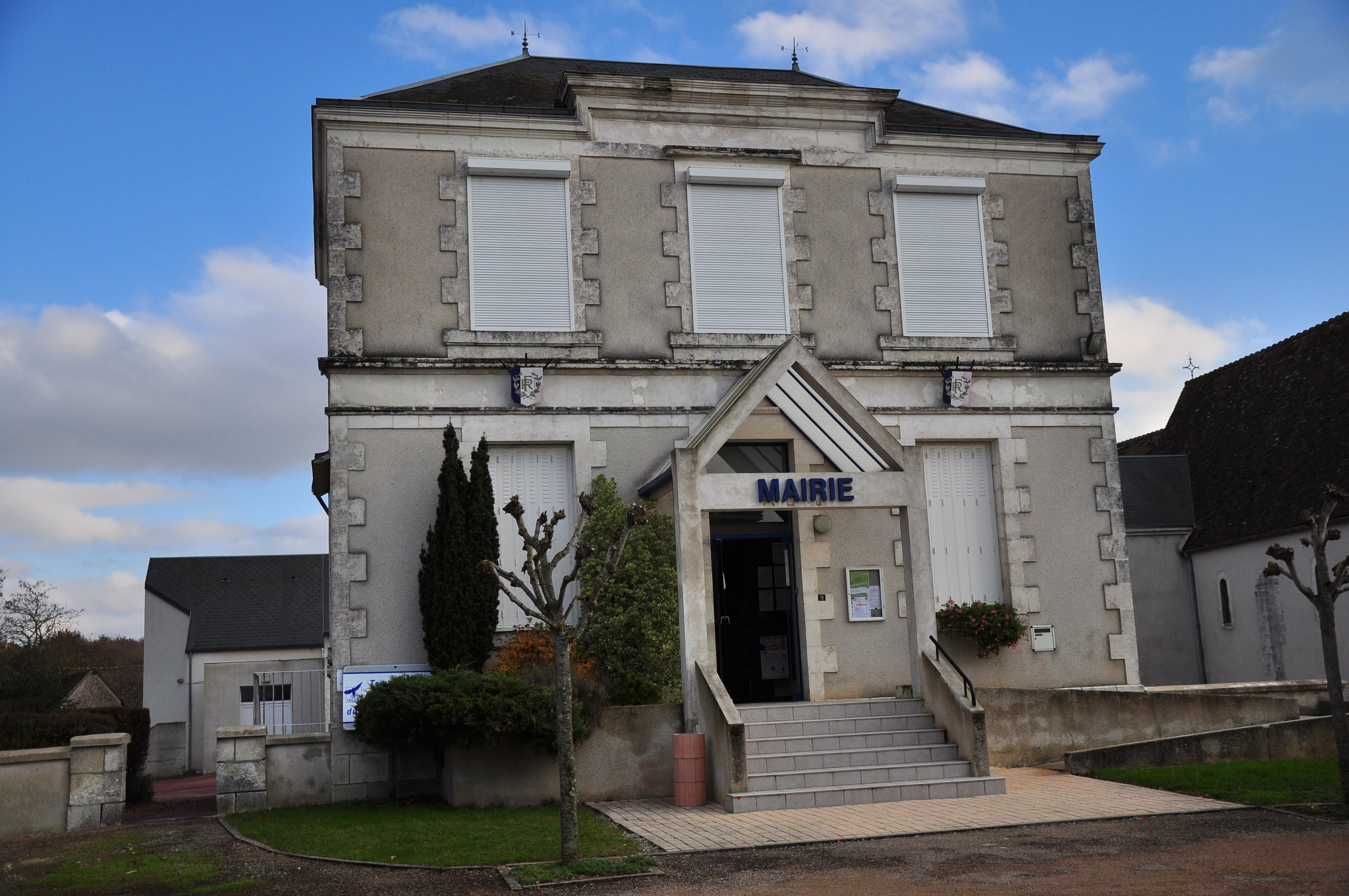 Neuillay-les-Bois (Indre) - Mairie